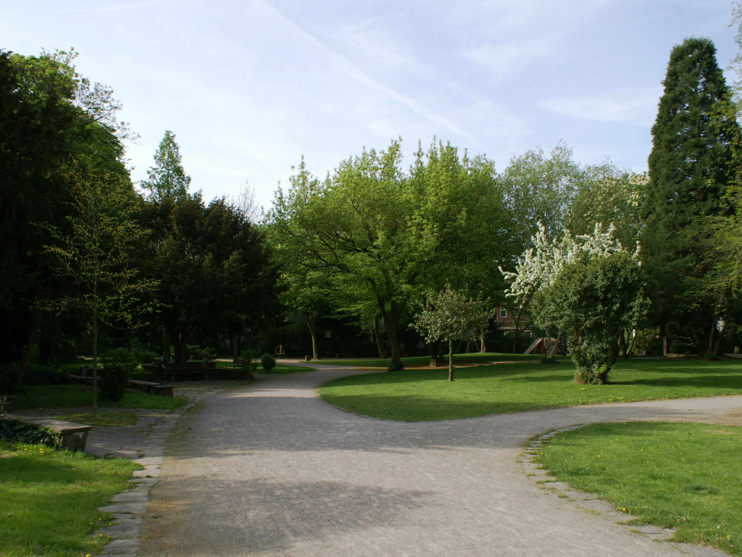 Überblick über den Stadtgarten Kalk